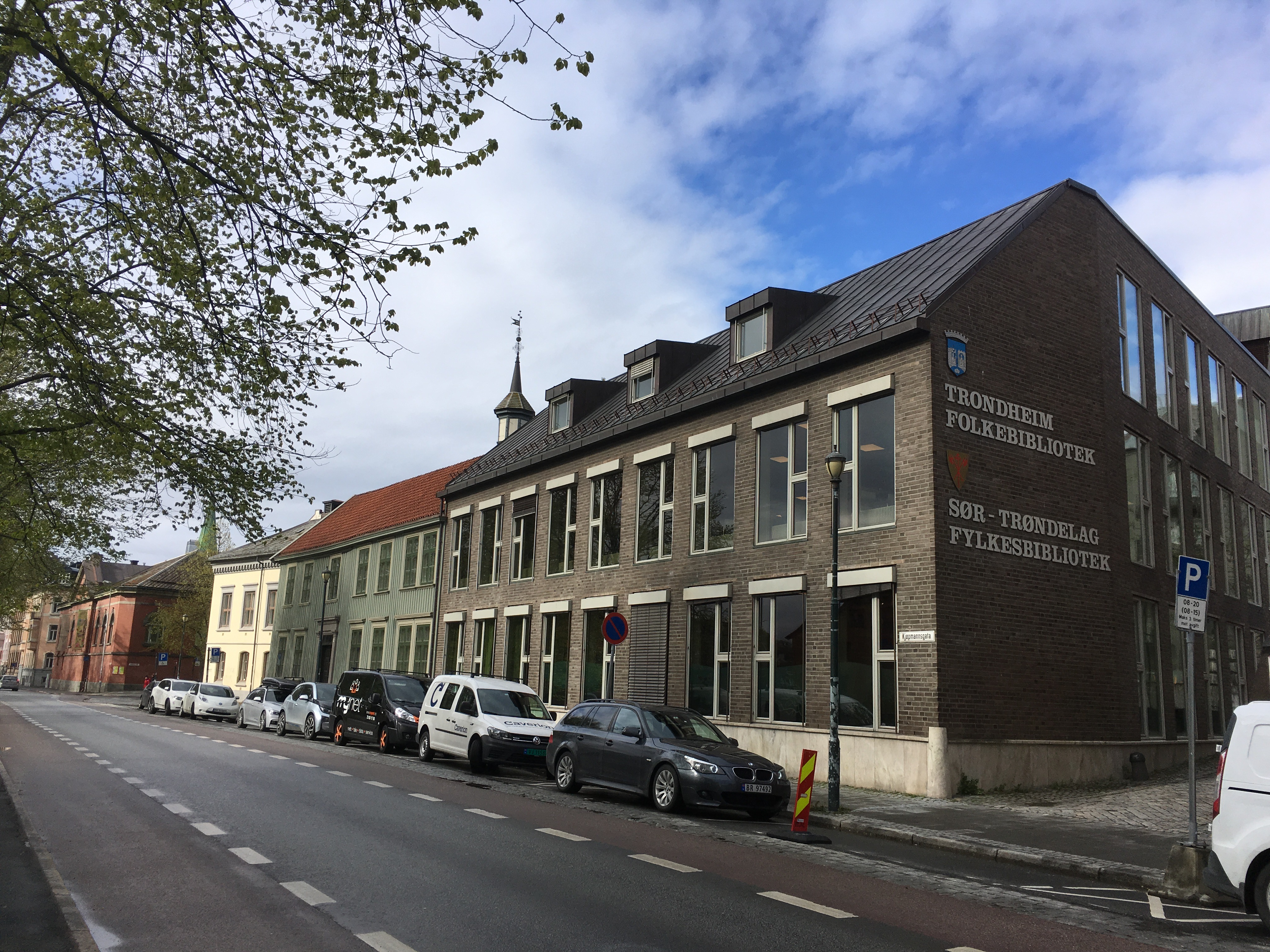 Nærmest: Bygningen fra 1989, deretter Lorckgården og det gamle rådhuset. Lengst t.v. på bildet anes Kjøpmannsgata 12, der biblioteket ble etablert i 1902